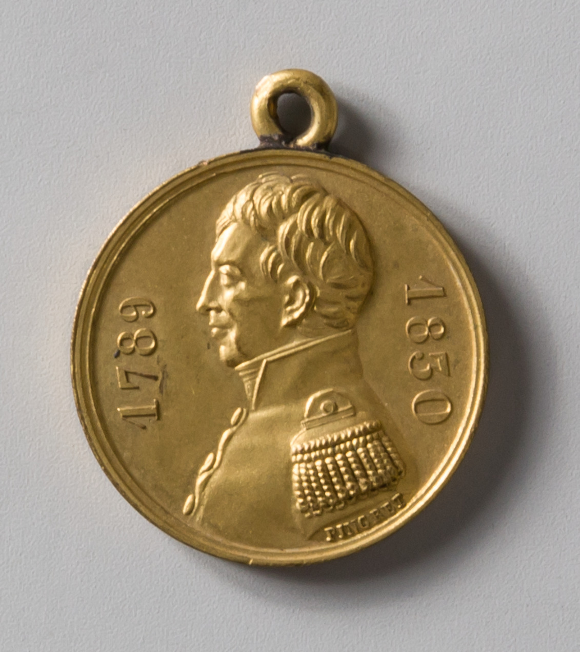 Medal; Metal